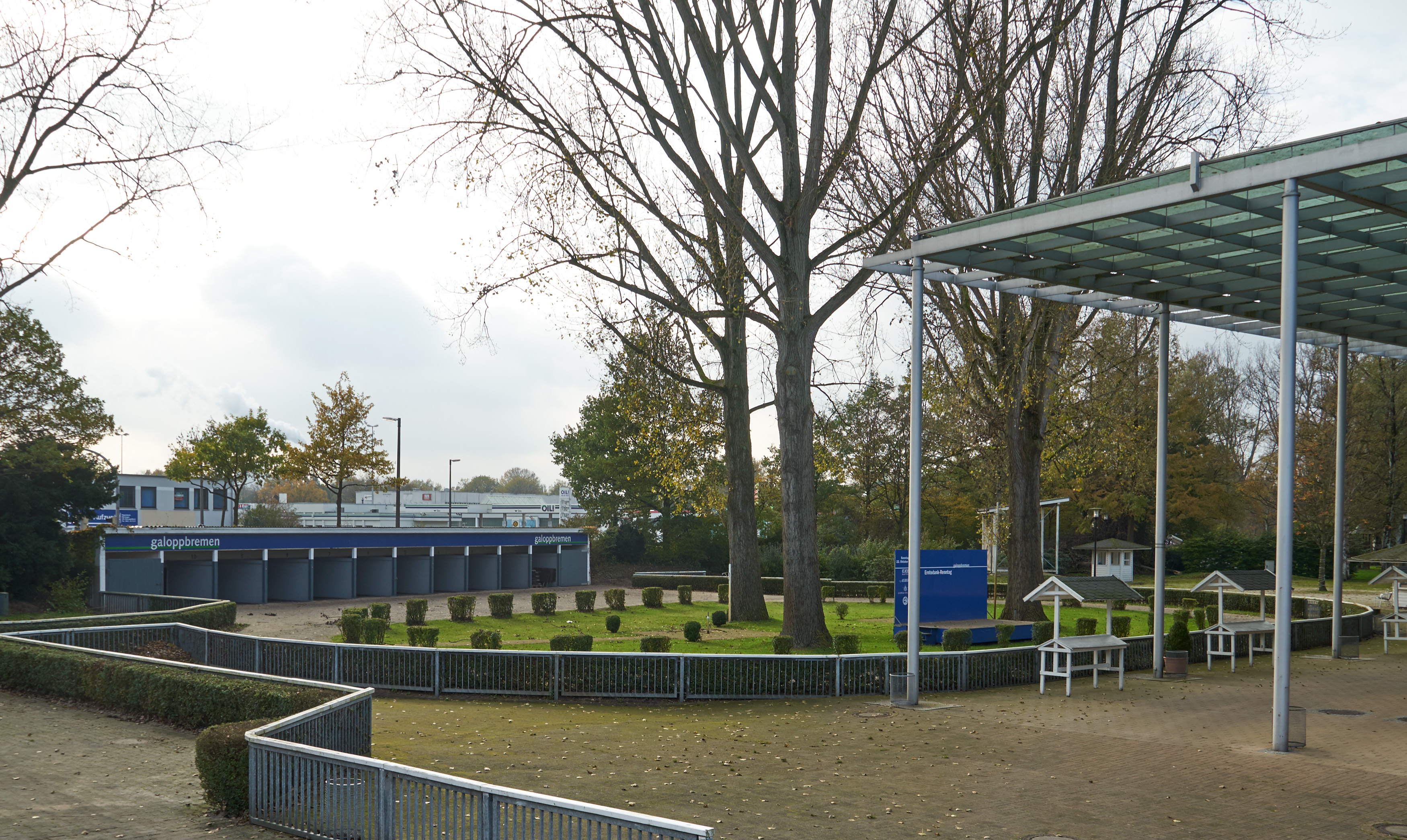 Galopprennbahn Bremen. Führring